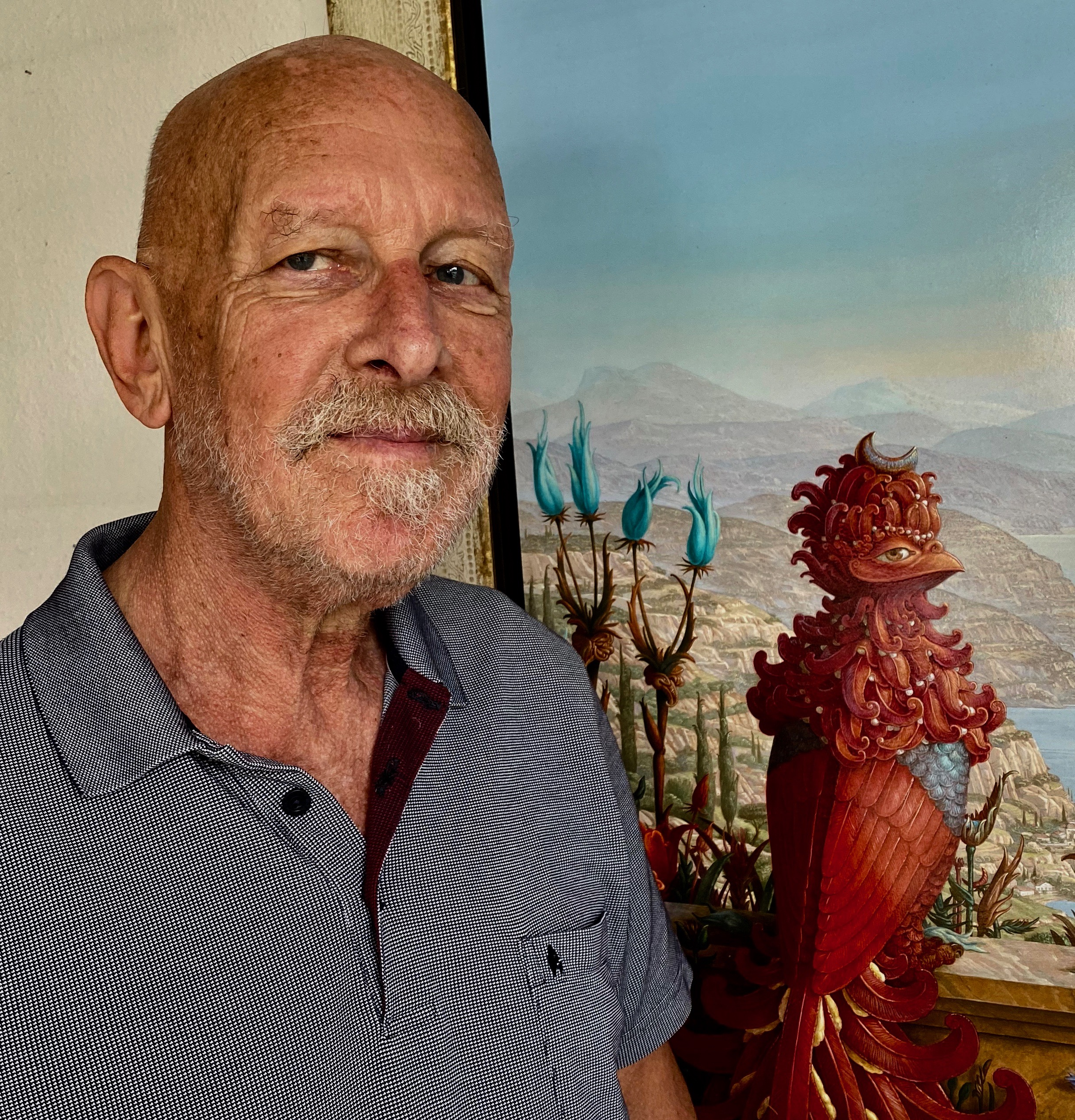 Porträt Künstler vor Werk Mondvogel.